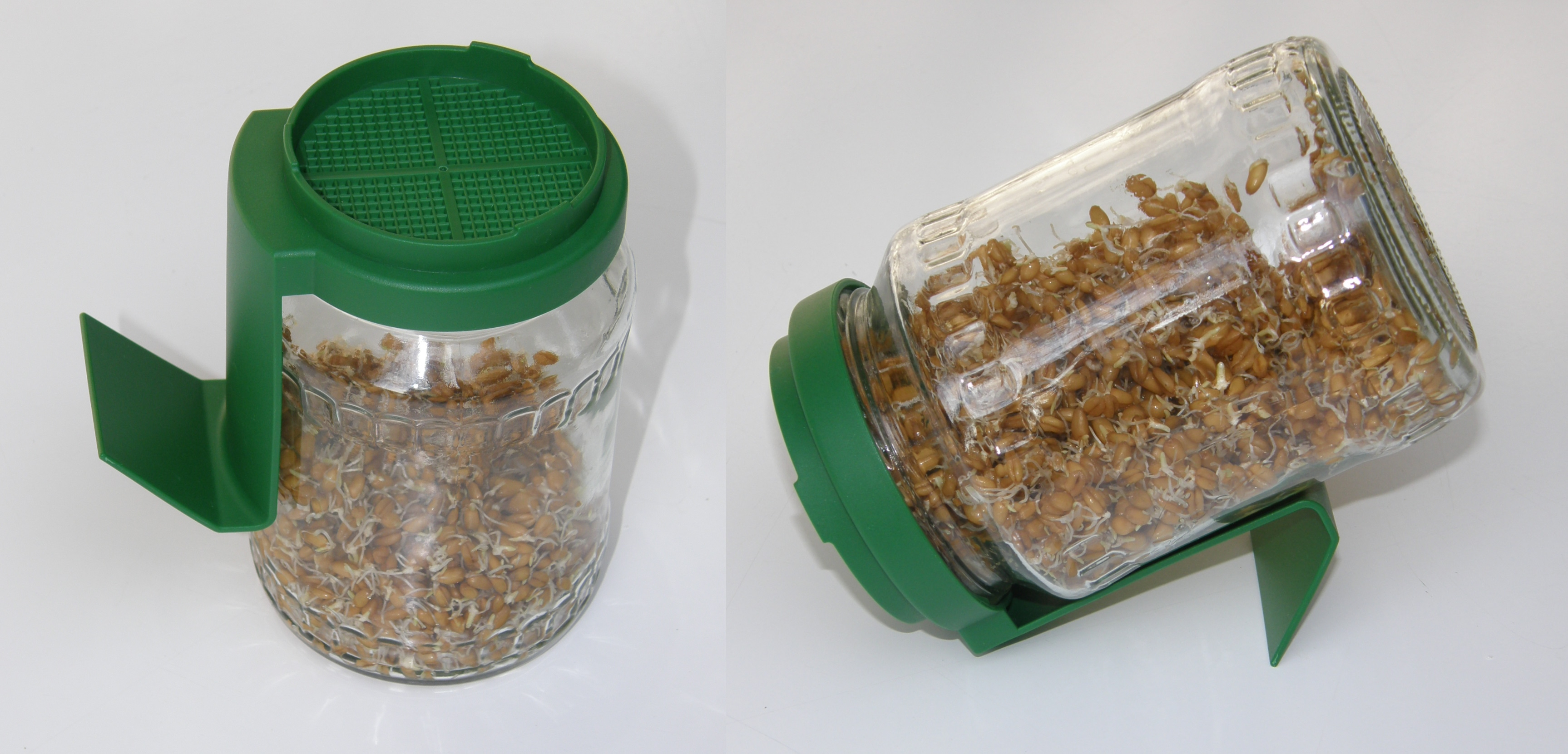 Sprossenglas mit "Weizen-Keimlingen"